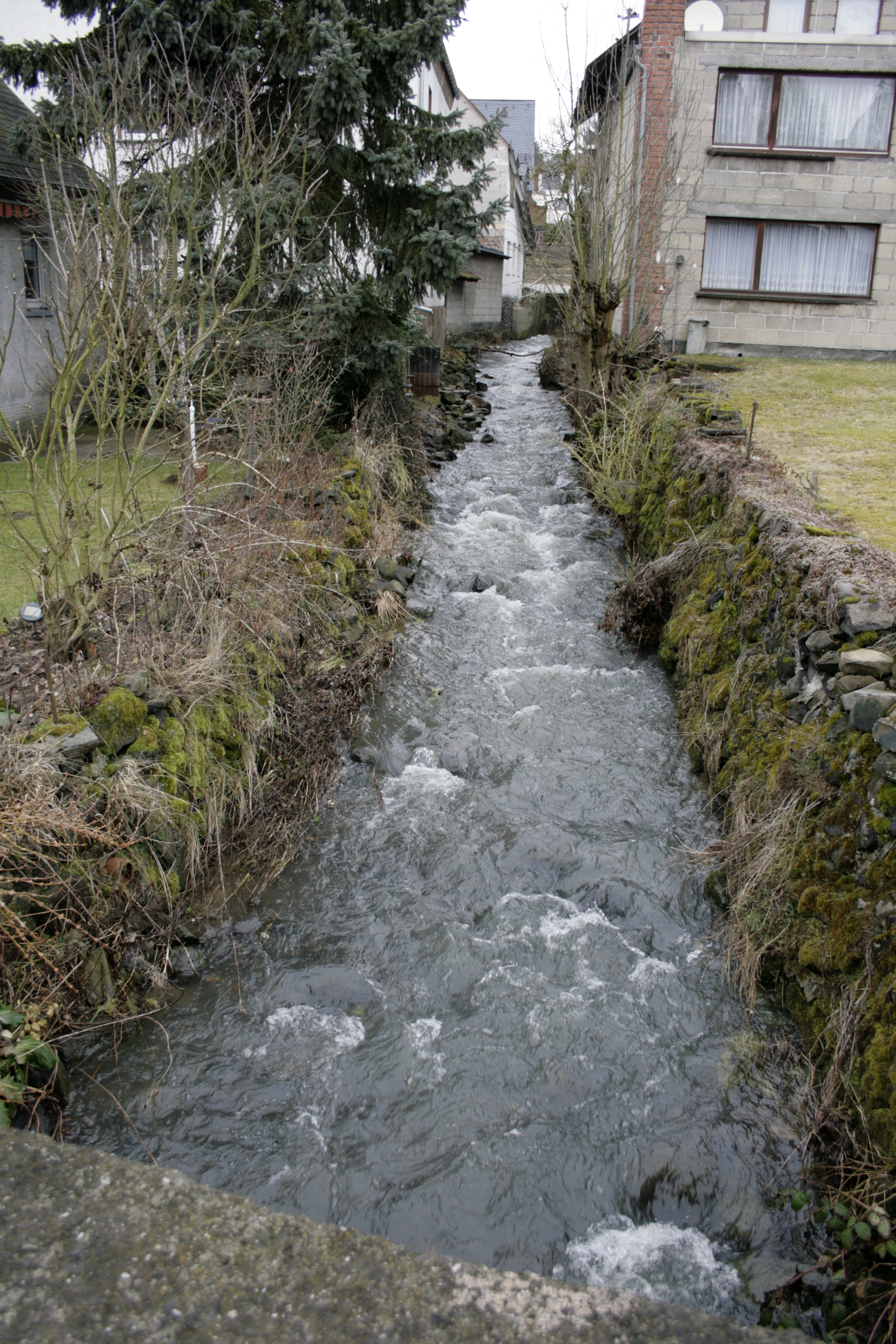 Dermesbach in Langendernbach, Deutschland